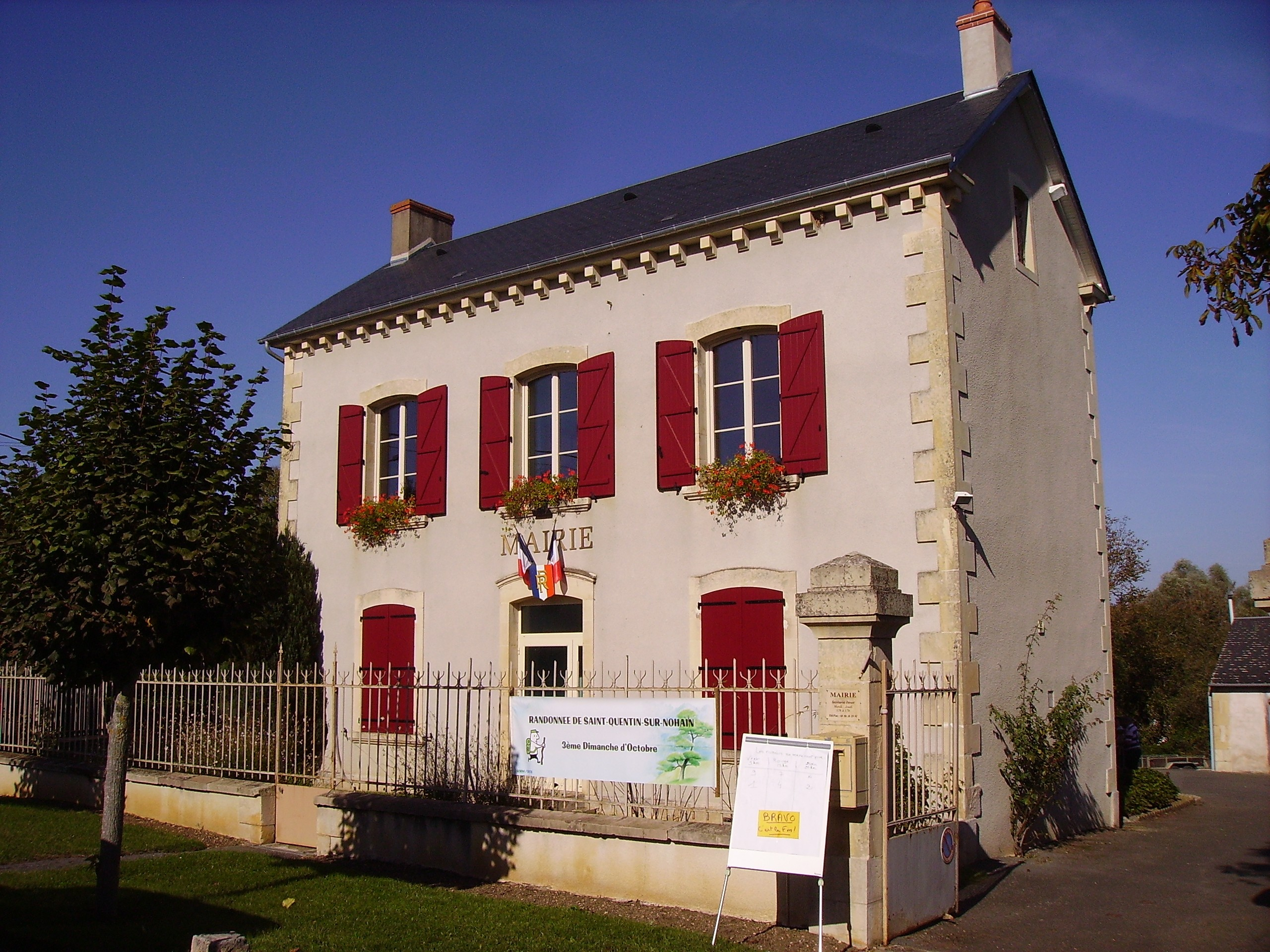 Mairie de Saint-Quentin-sur-Nohain, Nièvre, Bourgogne, France.